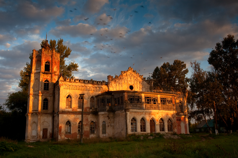 Усадьба «Авчурино» (Калужская область, Калуга, село Авчурино)